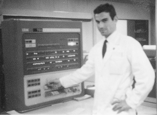 Operatore su console IBM704